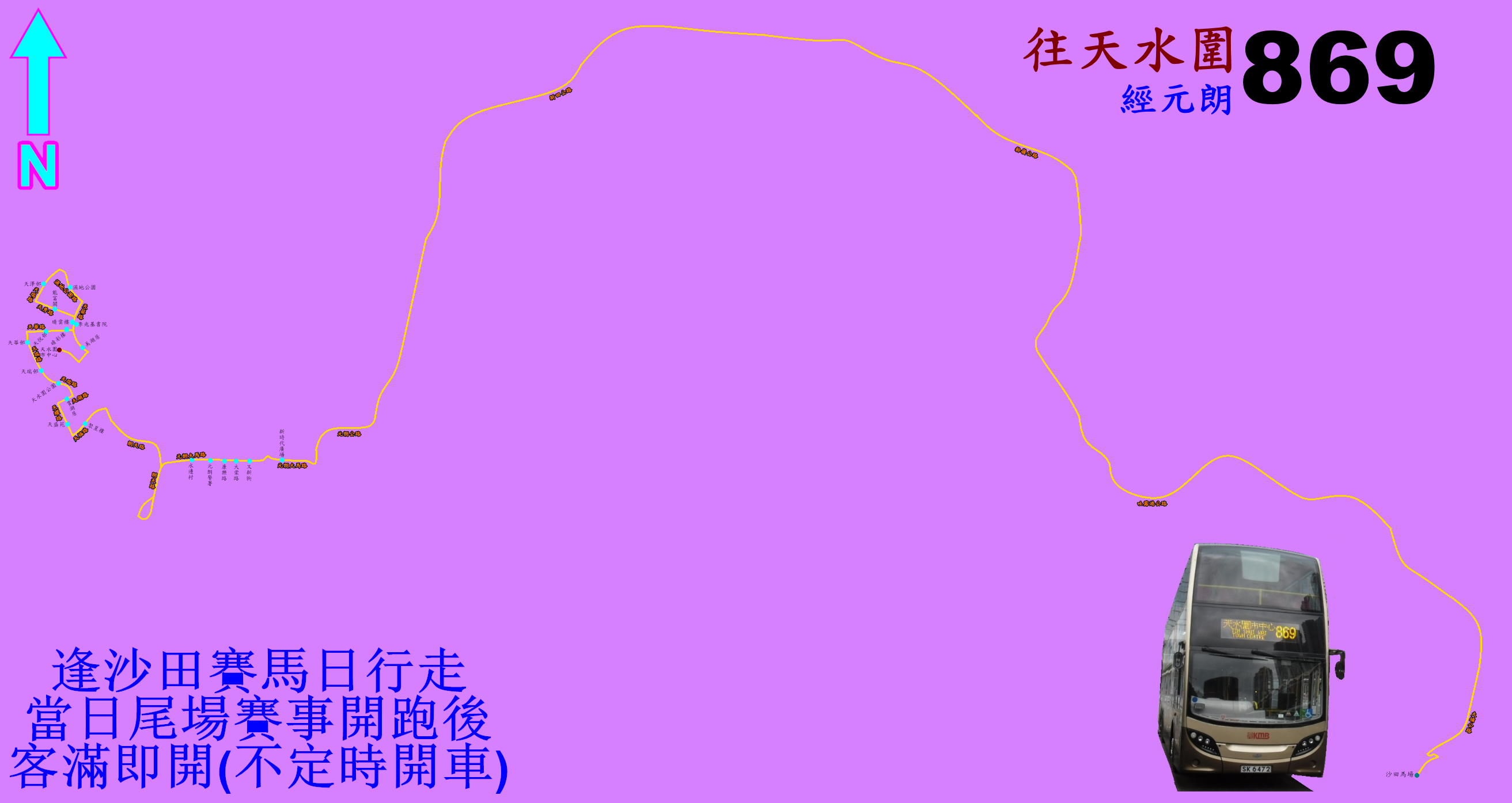 中文（香港）: 馬場巴士869線的走線圖